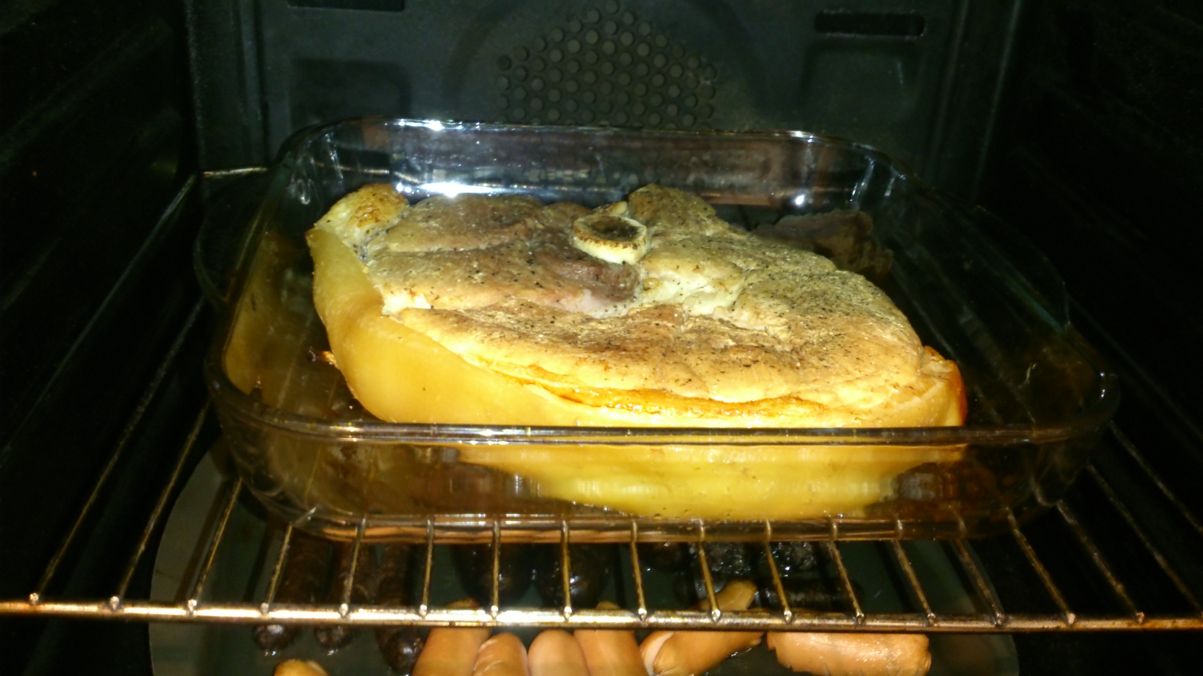 Ahjupannil küpsev seapraad, selle all vormis viinerid ja verivorstid